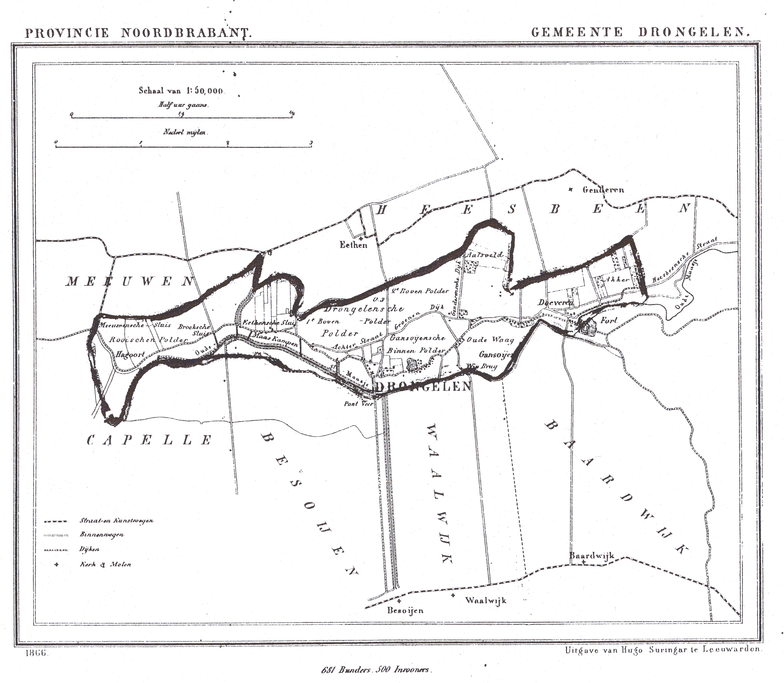 Nederland, Noord-Brabant, Gemeente Drongelen